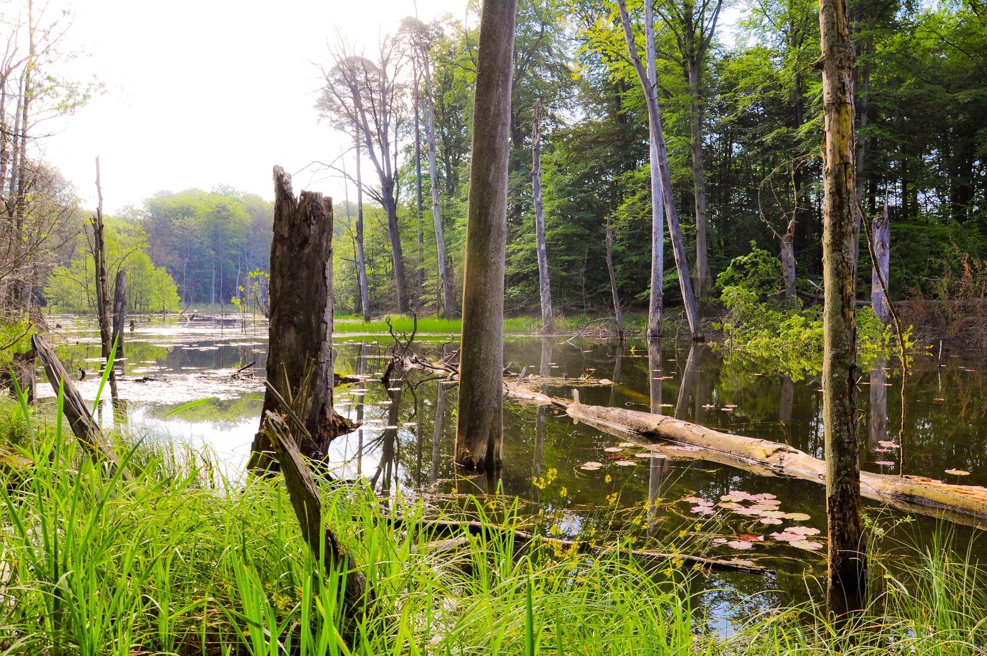 Müritz-Nationalpark, Ostteil Serrahn: Am Nordufer des Schweingartensees am Rand des Totalreservates Serrahner Urwald.